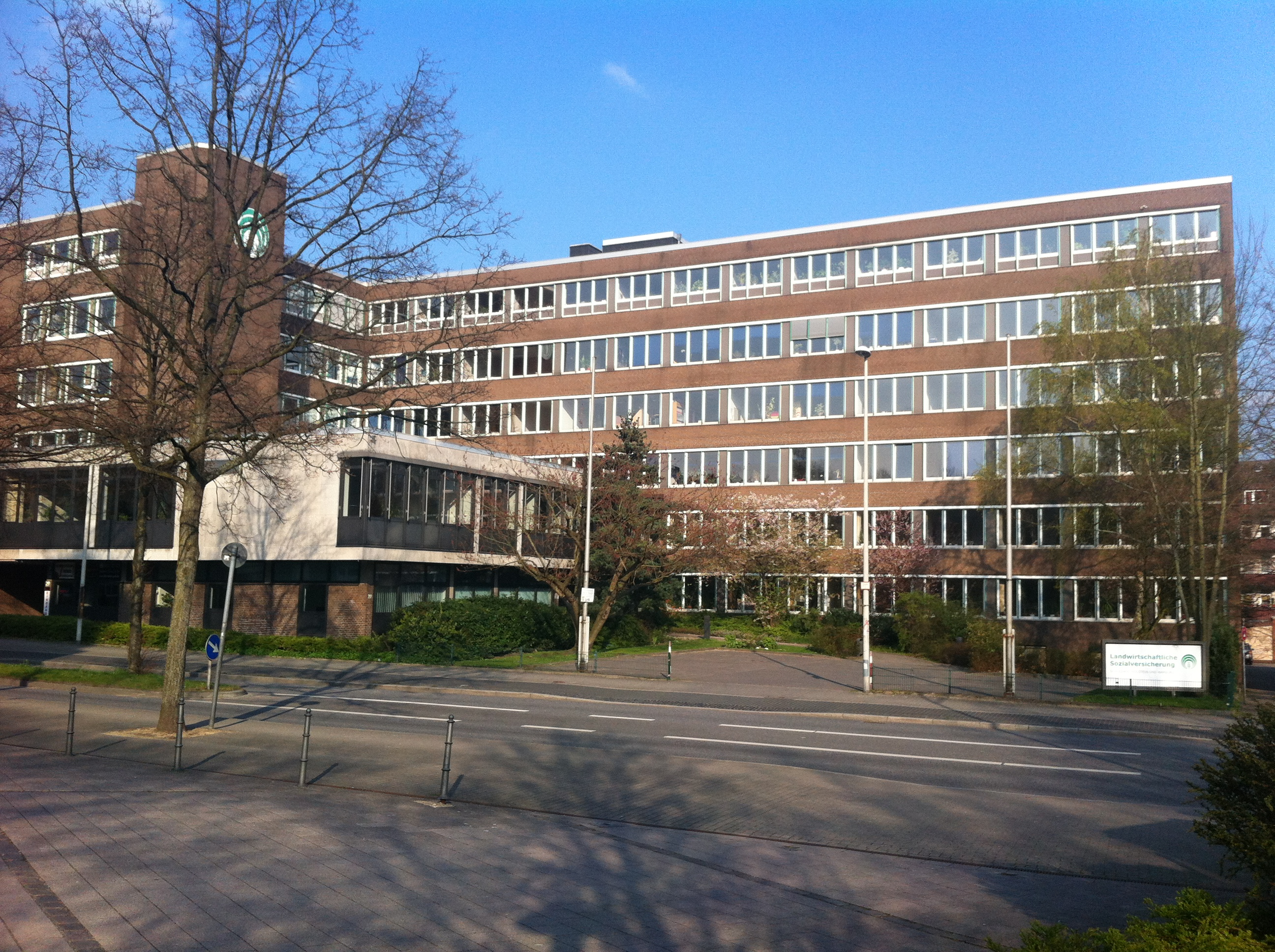 Verwaltungsgebäude SVLFG Kiel